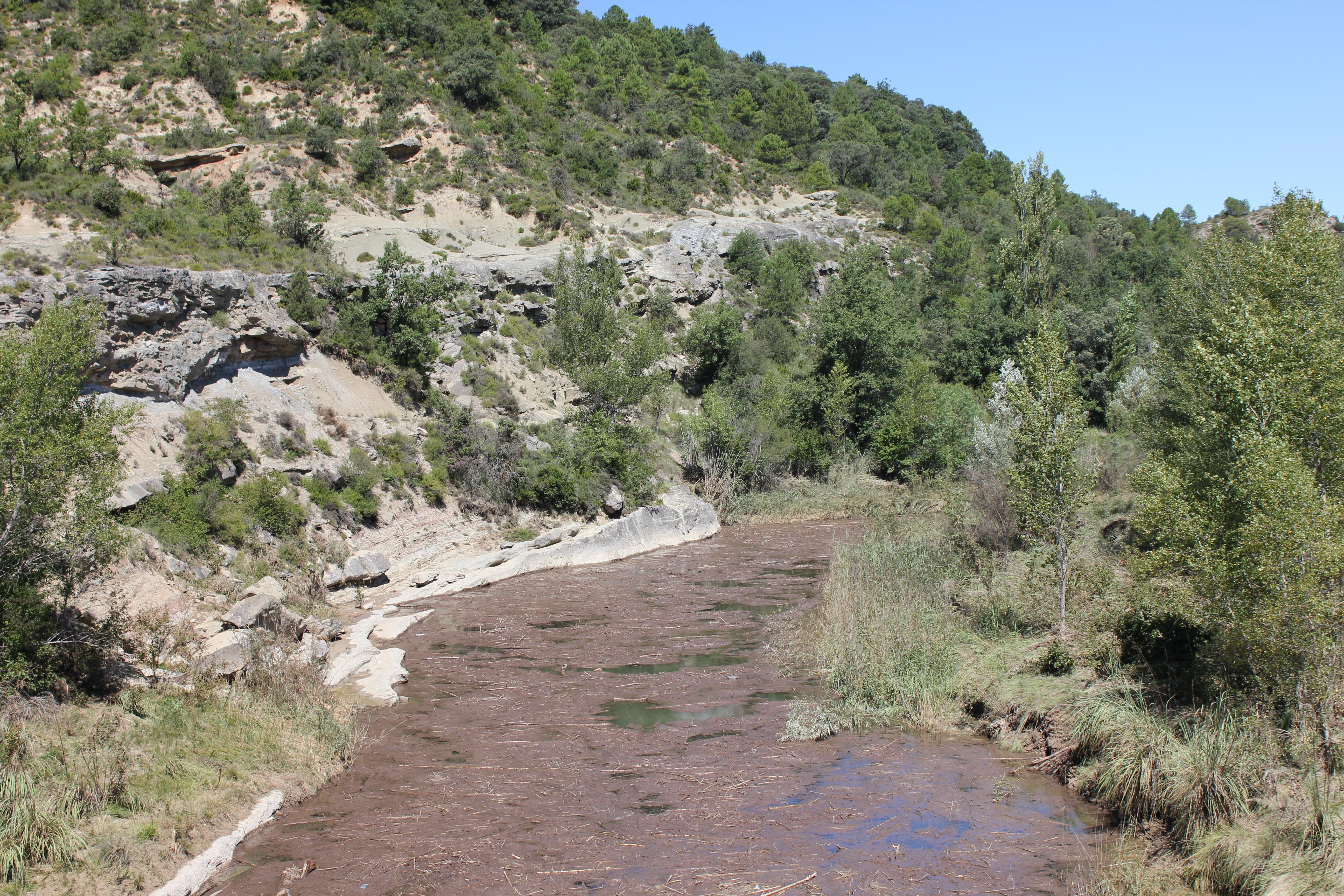 Aragonés: Trampo final d'o río Susía, en a desembocadura en a coda d'o pantano d'o Grau.